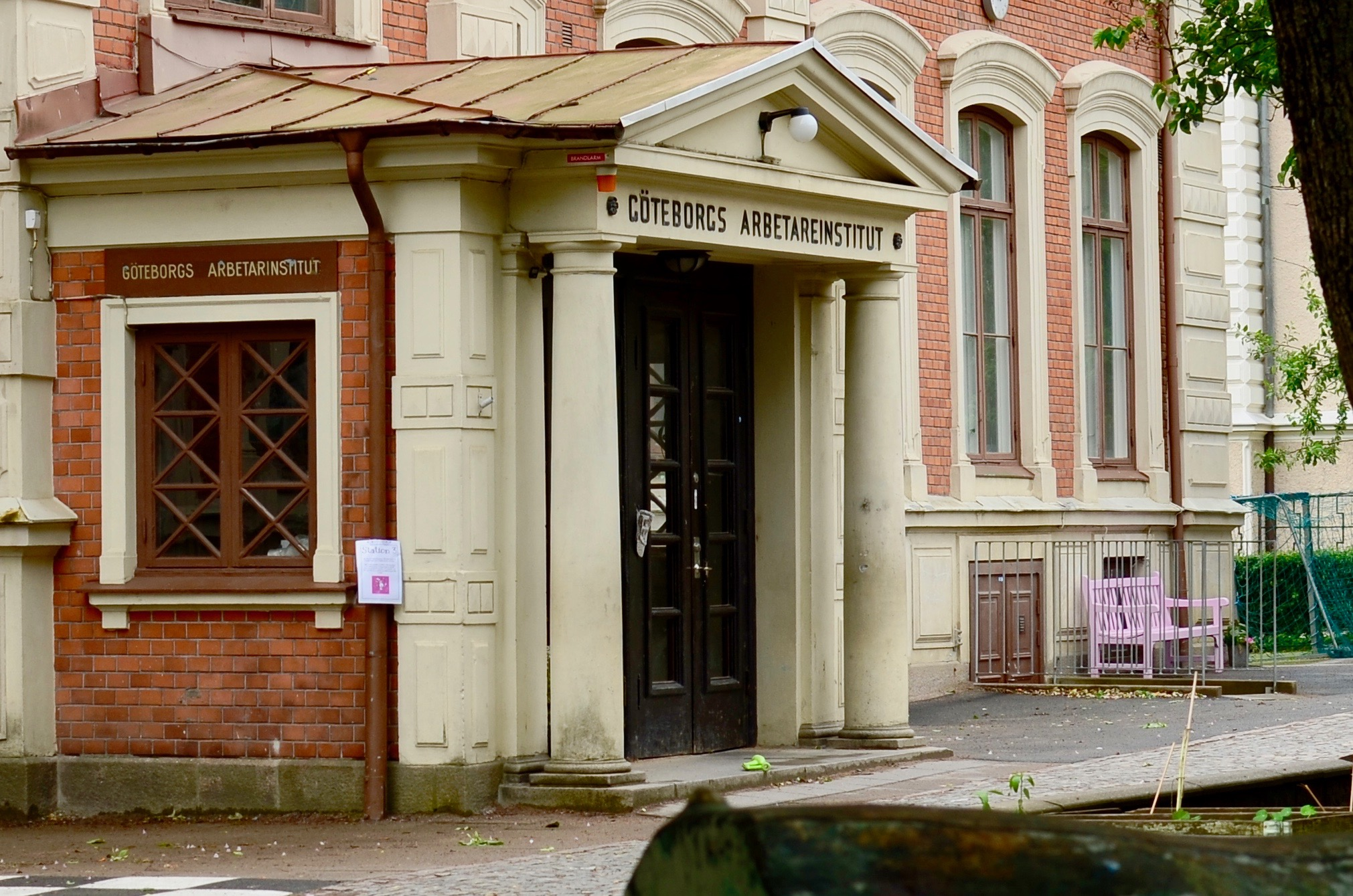 Söderfasaden av det som ursprungligen var Göteborgs handelshögskola men som från 1925 inhyste Göteborgs arbetarinstitut.